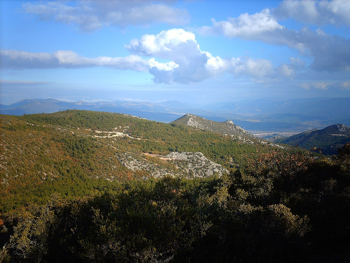 11500 Osmaneli/Bilecik, Turkey